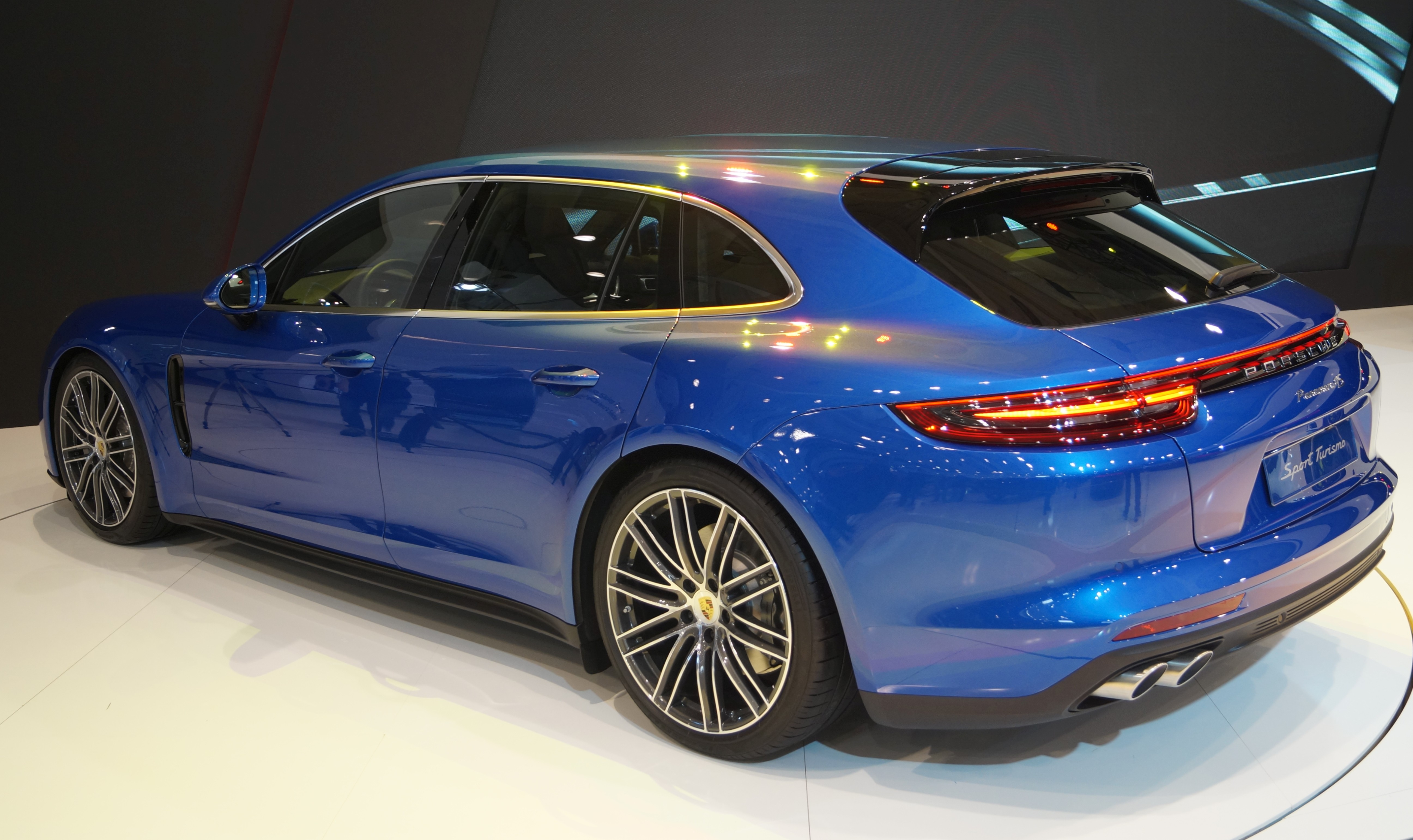 Lewy tył Porsche 971 Panamera Sport Turismo na Motor Show Poznań 2017.